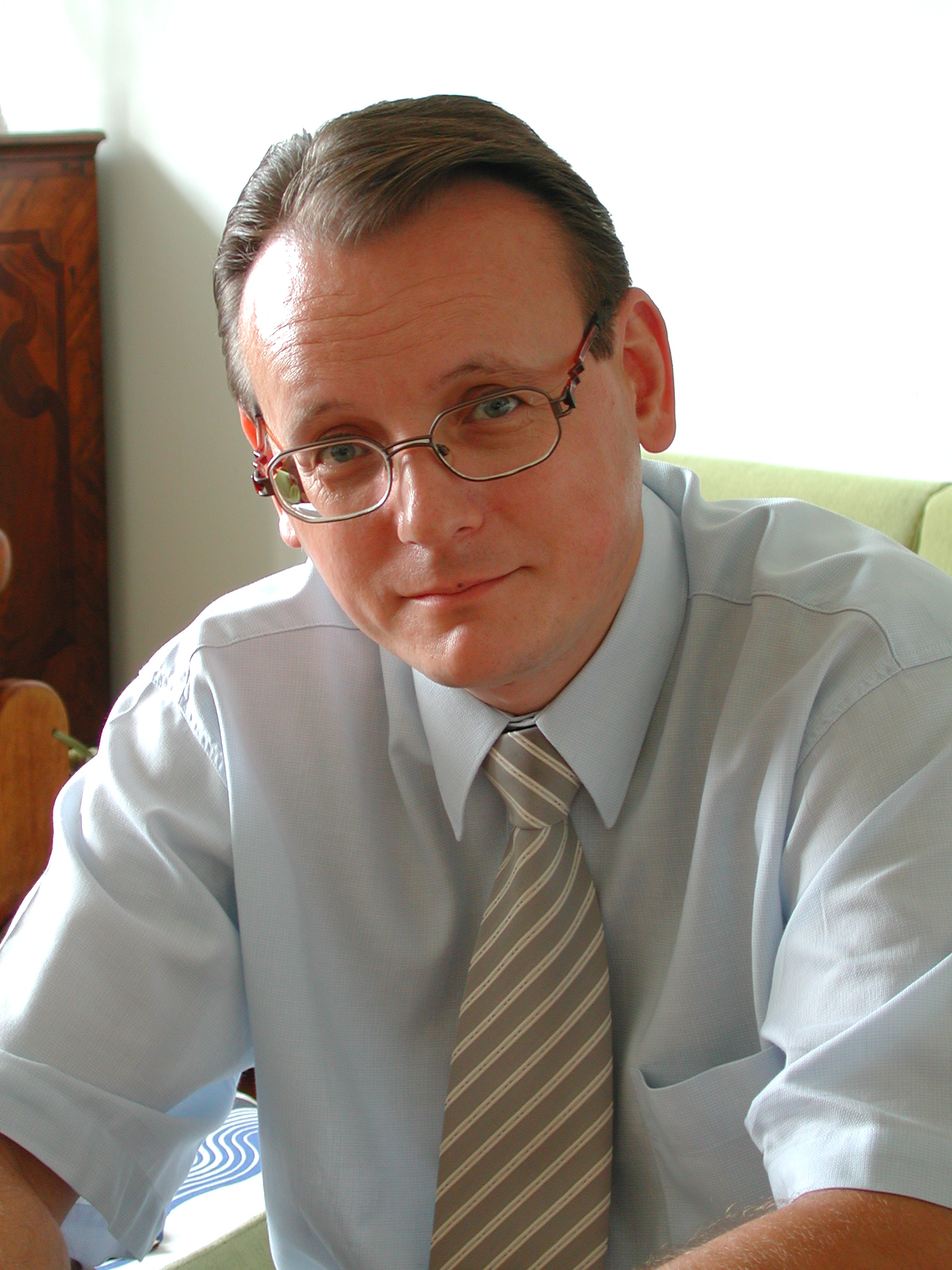 Pavol Janík portrét